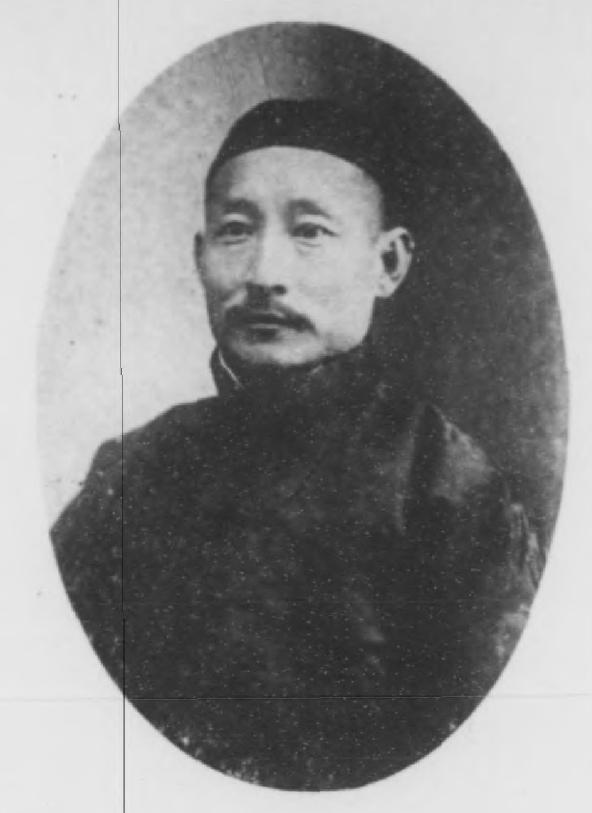 光緒甲辰科進士小像